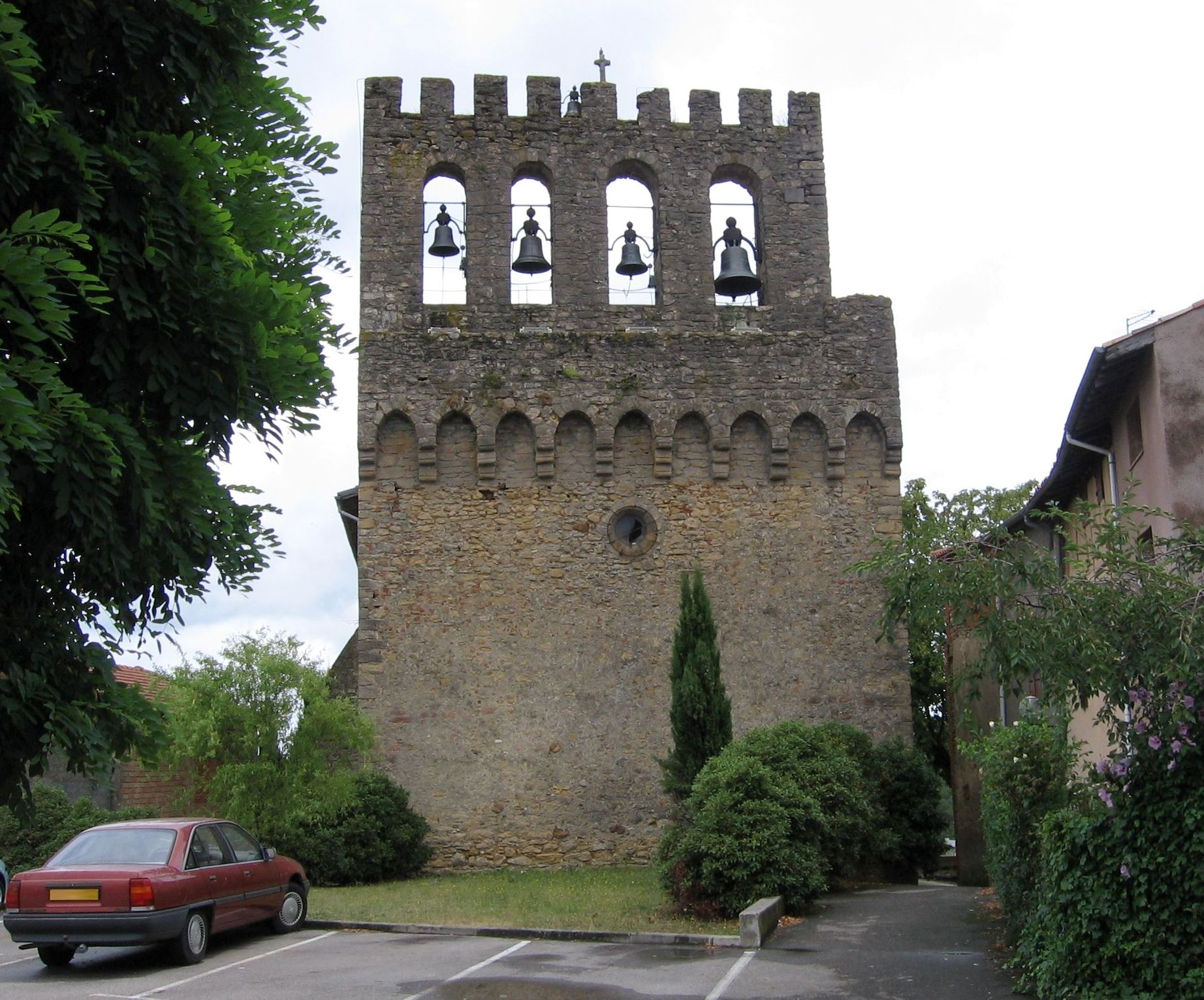 Clocher en peigne de l'église fortifiée Saint Blaise de Les Pujols (Ariège-France)